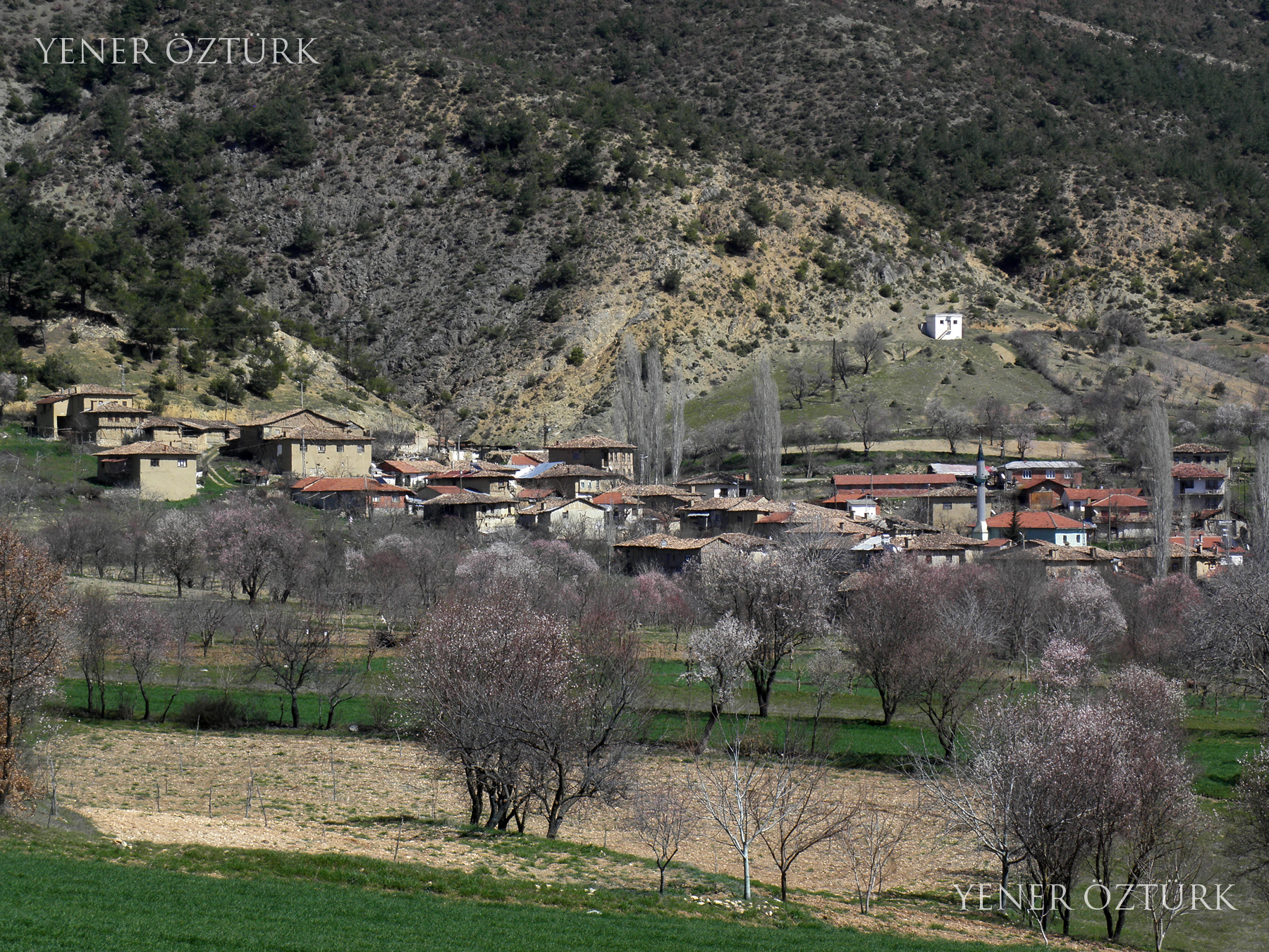 Gölpazarı - İncirli Köyü Genel Görünüşü